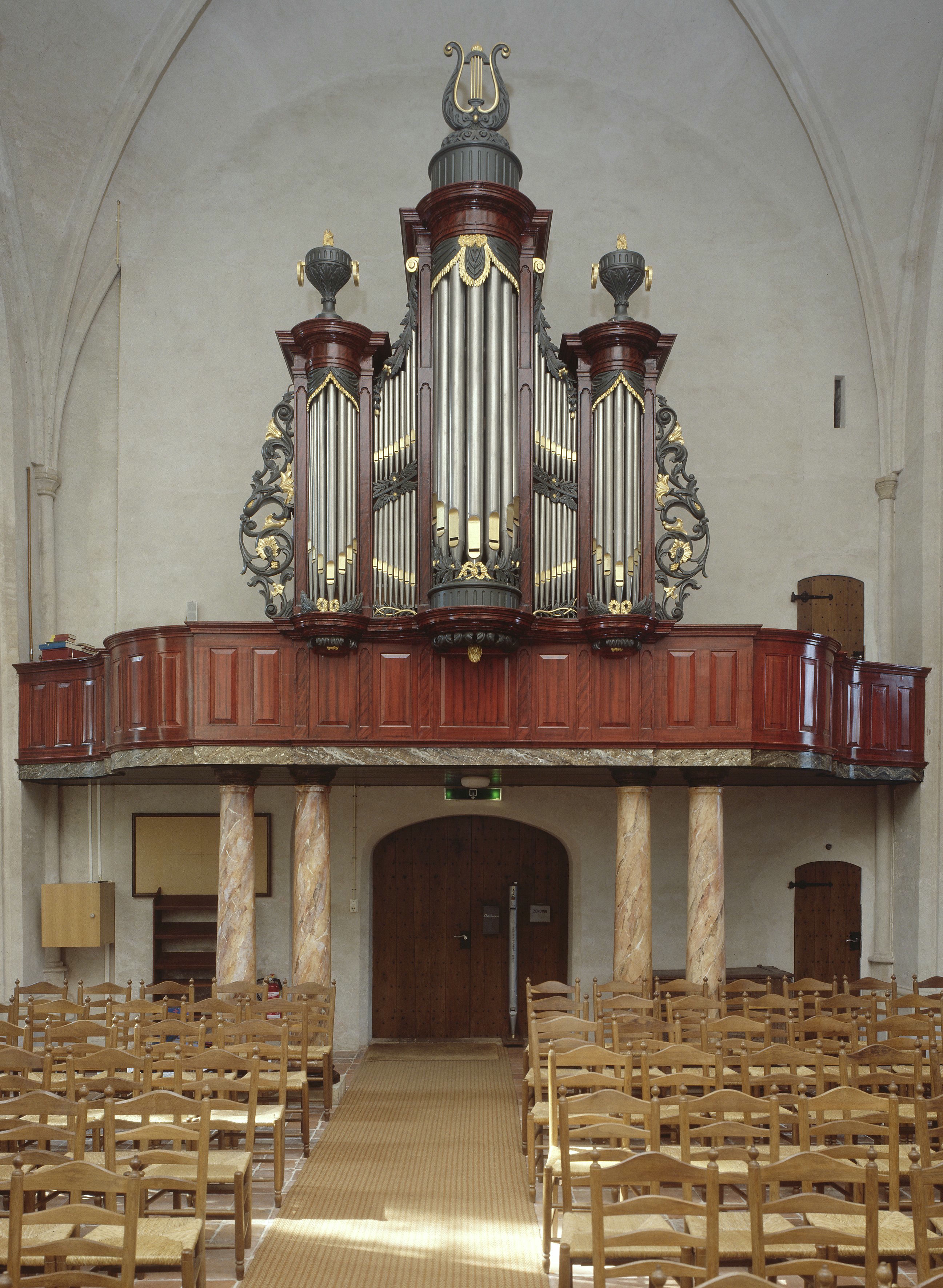 Nederlands Hervormde Kerk: Interieur, aanzicht orgel, orgelnummer 343 (opmerking: Gefotografeerd voor Het Historische Orgel in Nederland 1878-1886, Bladzijde 205)